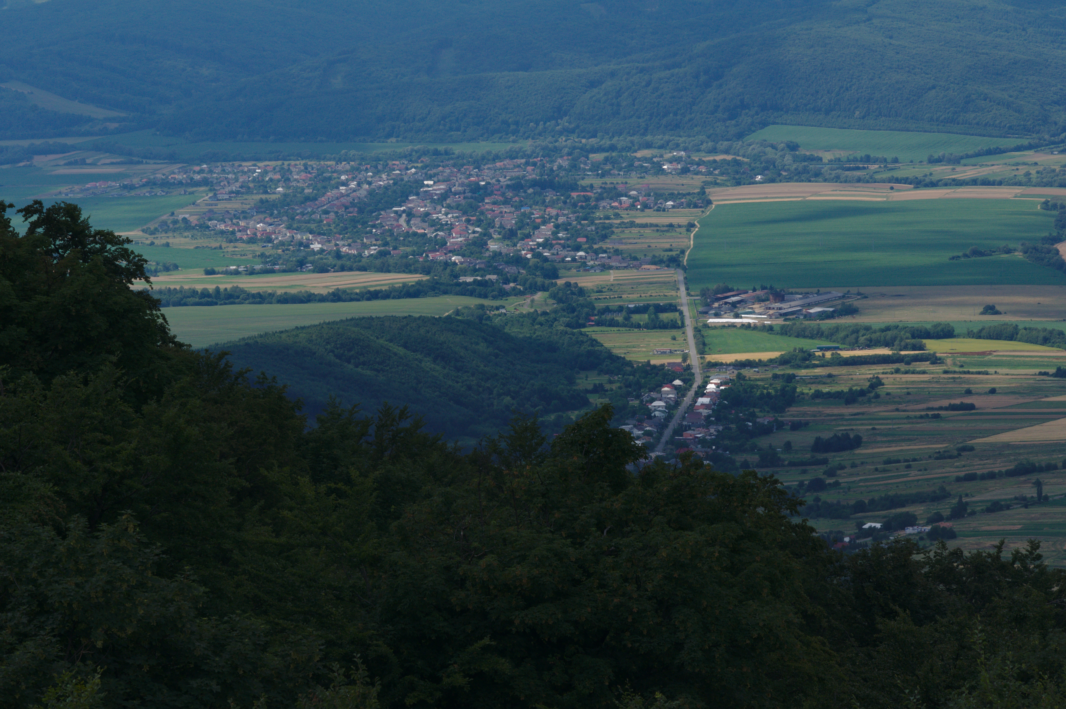 Prírodná pamiatka Sninský kameň - pohľad na obec Belá nad Cirochou, CHKO Vihorlat